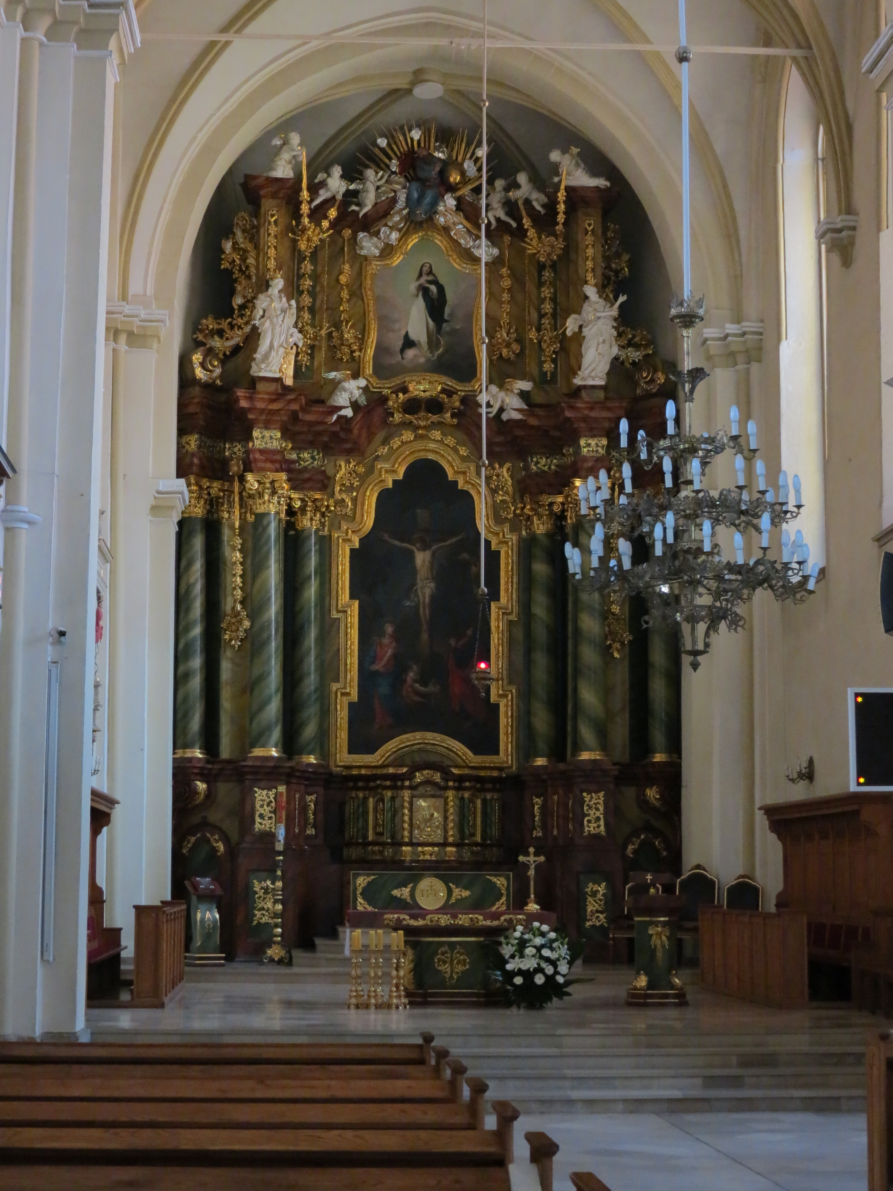 Złotoryja, kościół pomocniczy p.w. Narodzenia NMP, 1230, XVI, XX